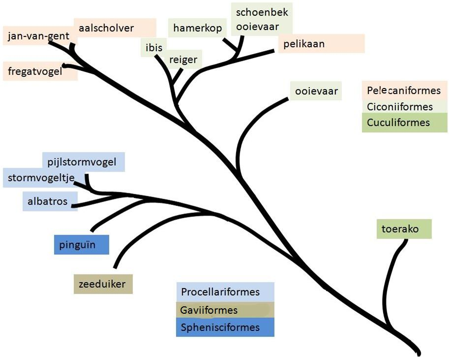 Stamboom van de watervogels volgens Harkett et al DNA 2008. Gecorrigeerde versie (Gaviiformes)